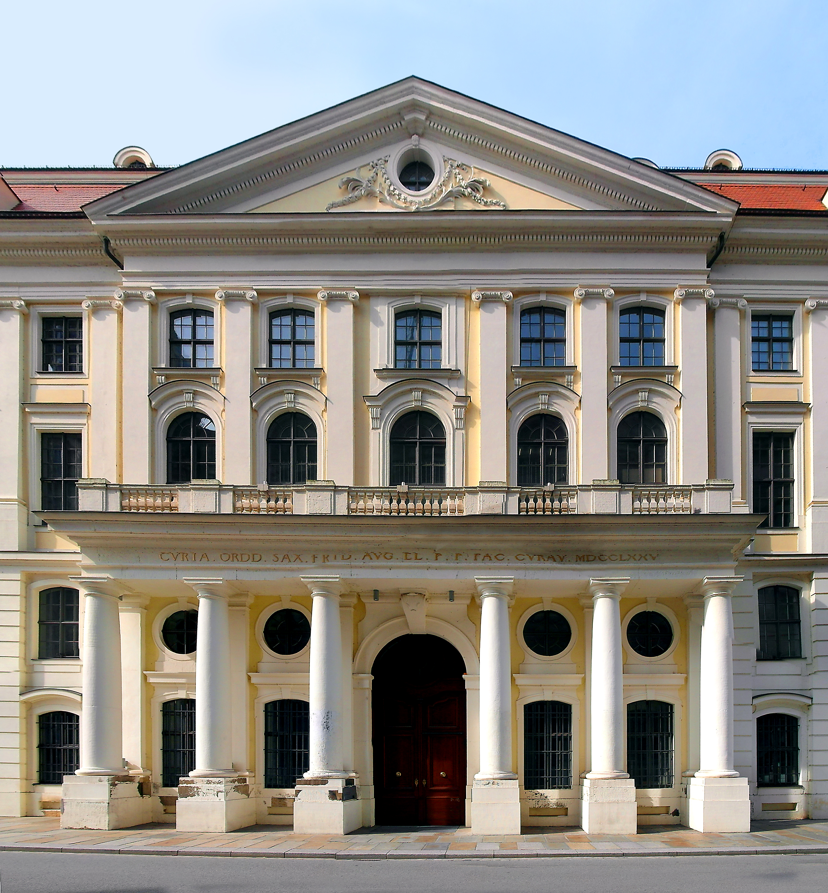 27.07.2014 01067 Dresden: Altes Landhaus, Fassade Landhausstraße. Frühklassizistisch (1770-1776 von F. A. Krubsacius). Heute Museum für Stadtgeschichte. [SAM5213+14+15+16.JPG]20140727355M4DR.JPG(c)Blobelt